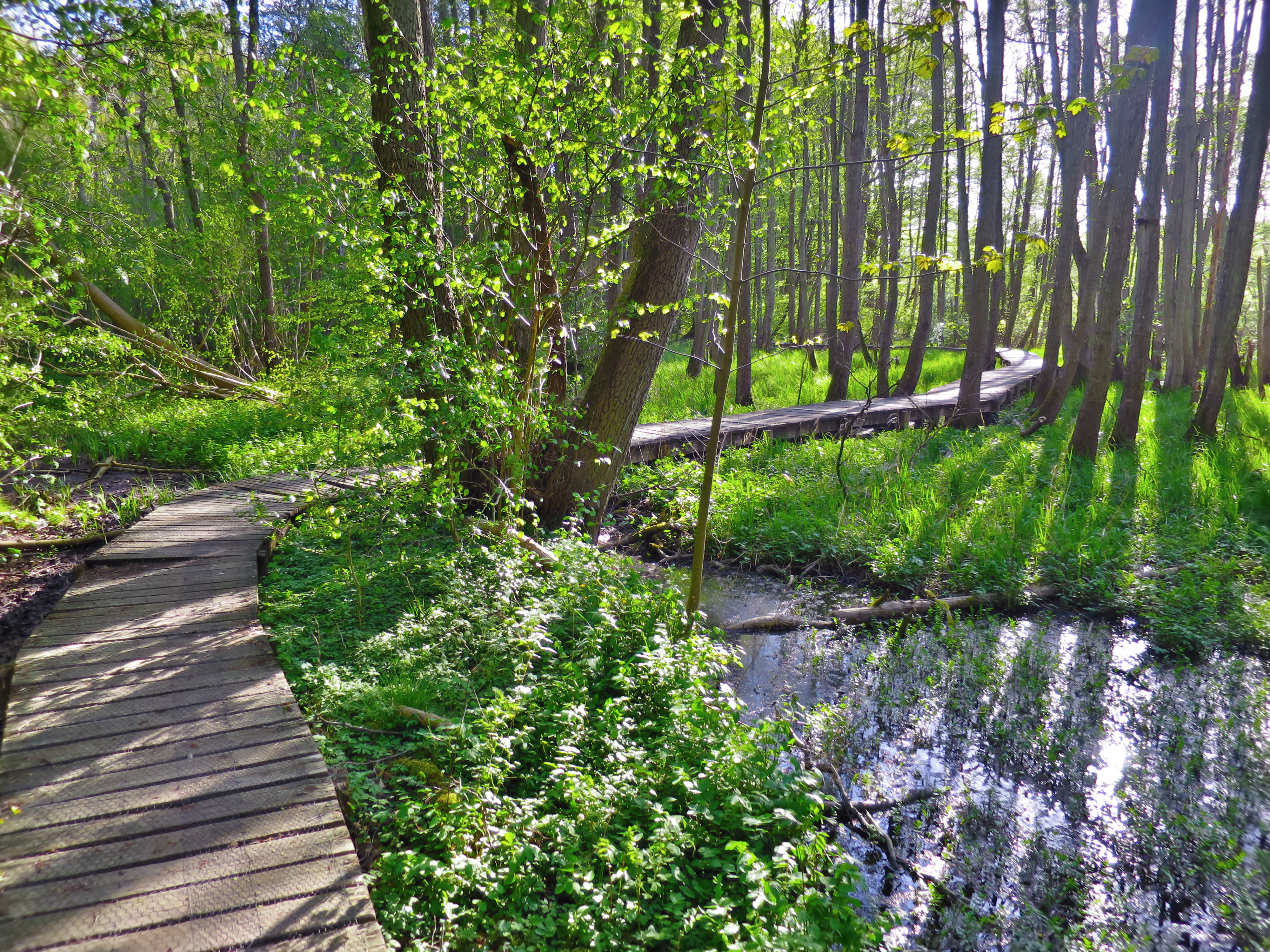 Gangbro over Ellesumpen i Moesgård Skov - en del af Oldtidsstien.